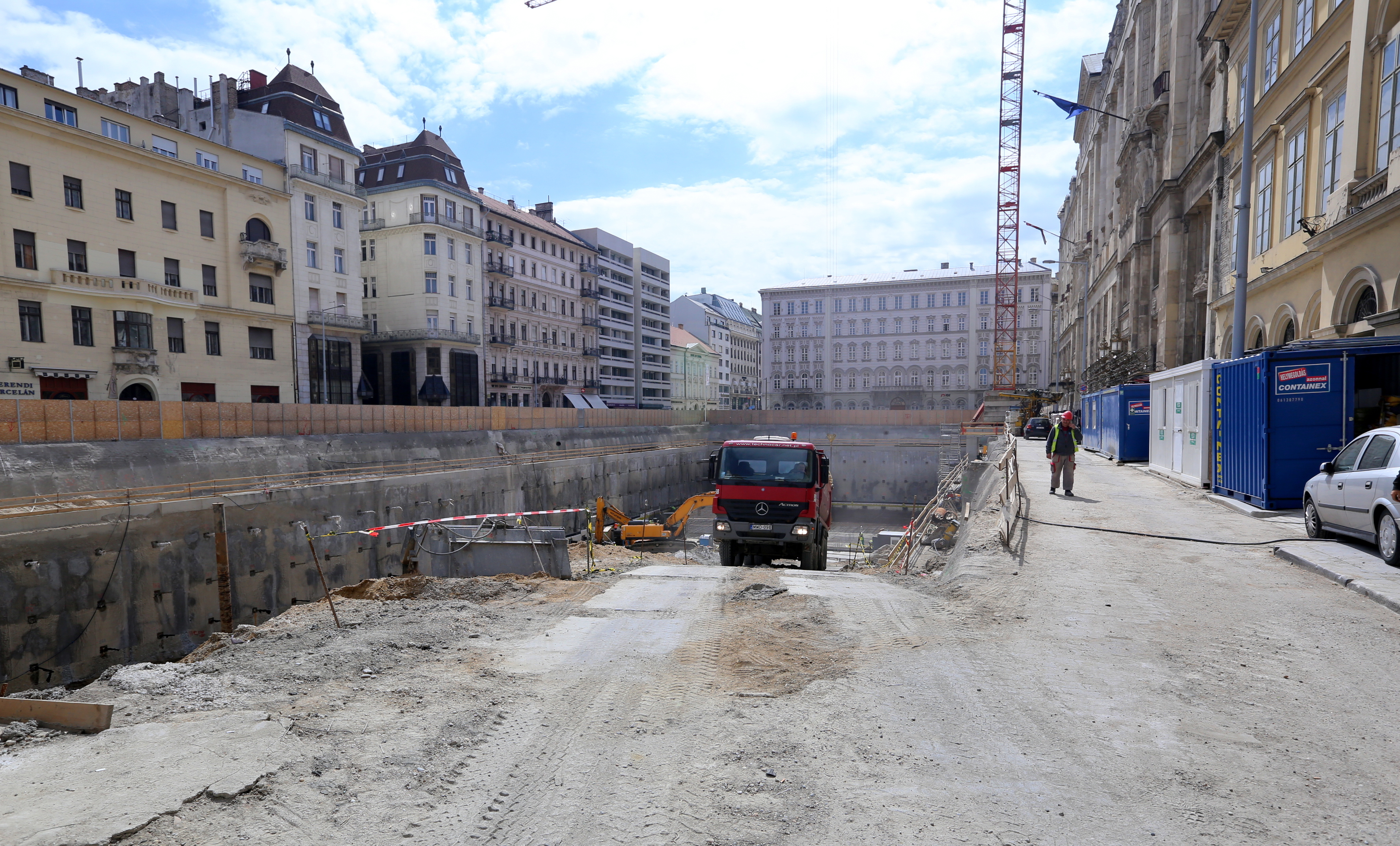 József nádor Square,(Budapest)